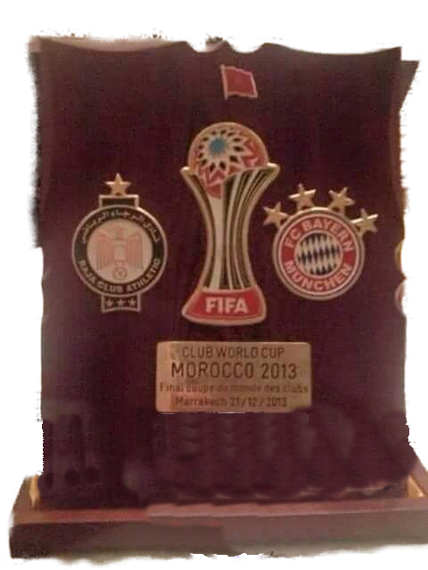 وصيف كأس العالم للأندية 2013